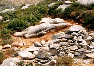 Kouros near Melanes, Naxos, Greece